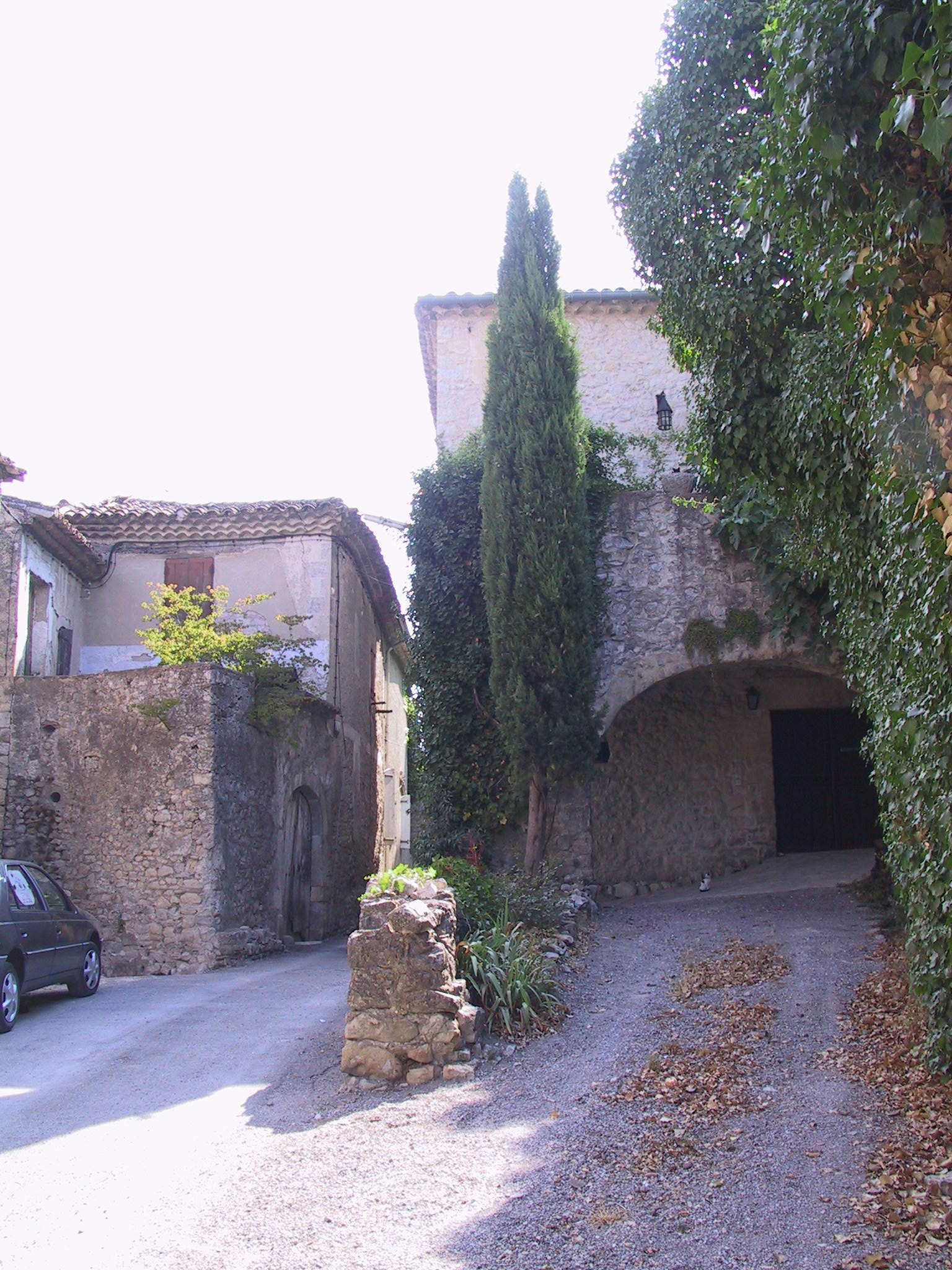 Voie Régordane